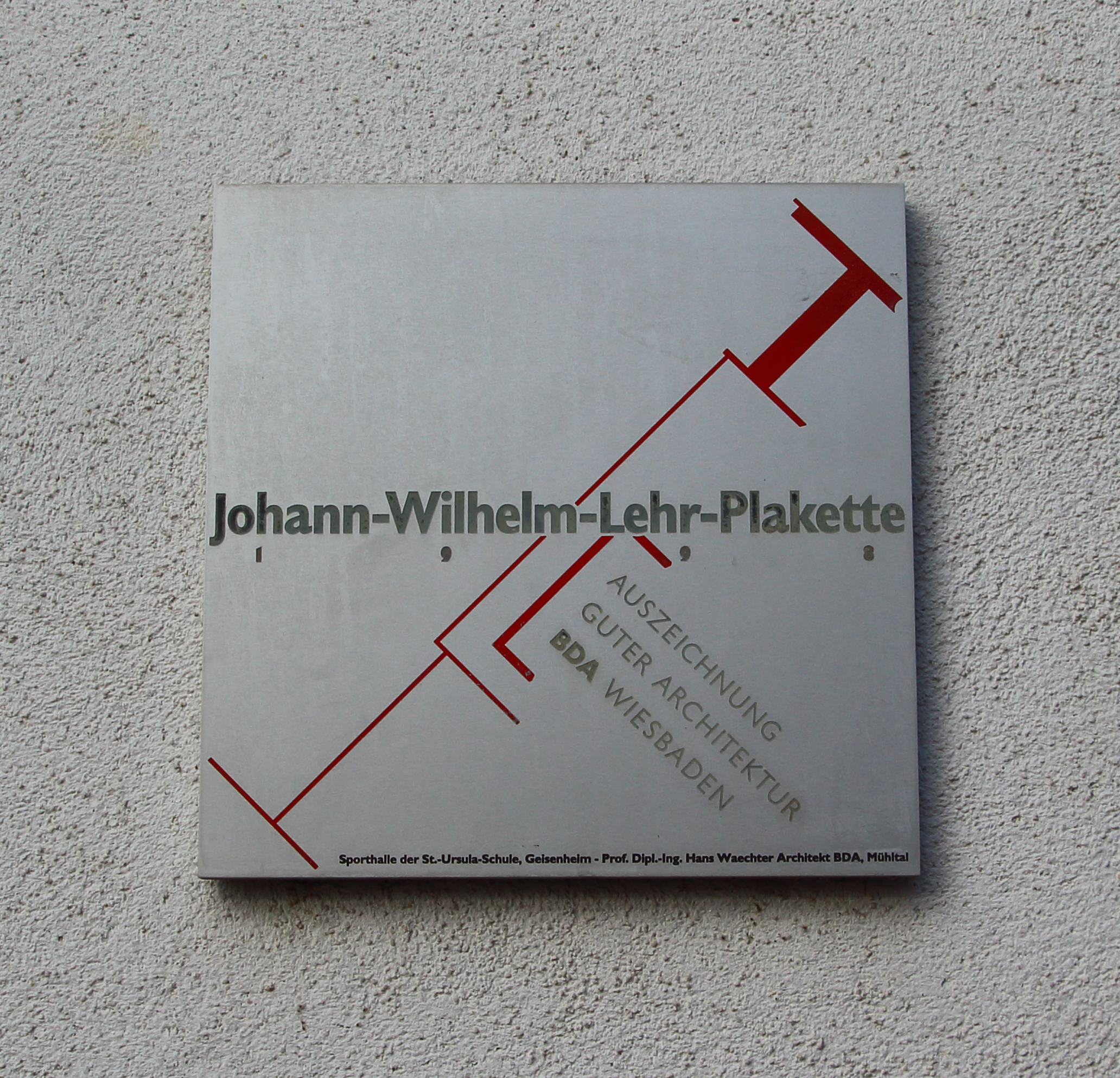 Neue Turnhalle von 1995 nach Plänen des Architekten Hans Waechter aus Mühltal. Hier: Johann-Wilhelm-Lehr-Plakette. Auszeichnung des Bundes deutscher Architekten für gute Architektur. St. Ursula-Schule, Geisenheim am Rhein